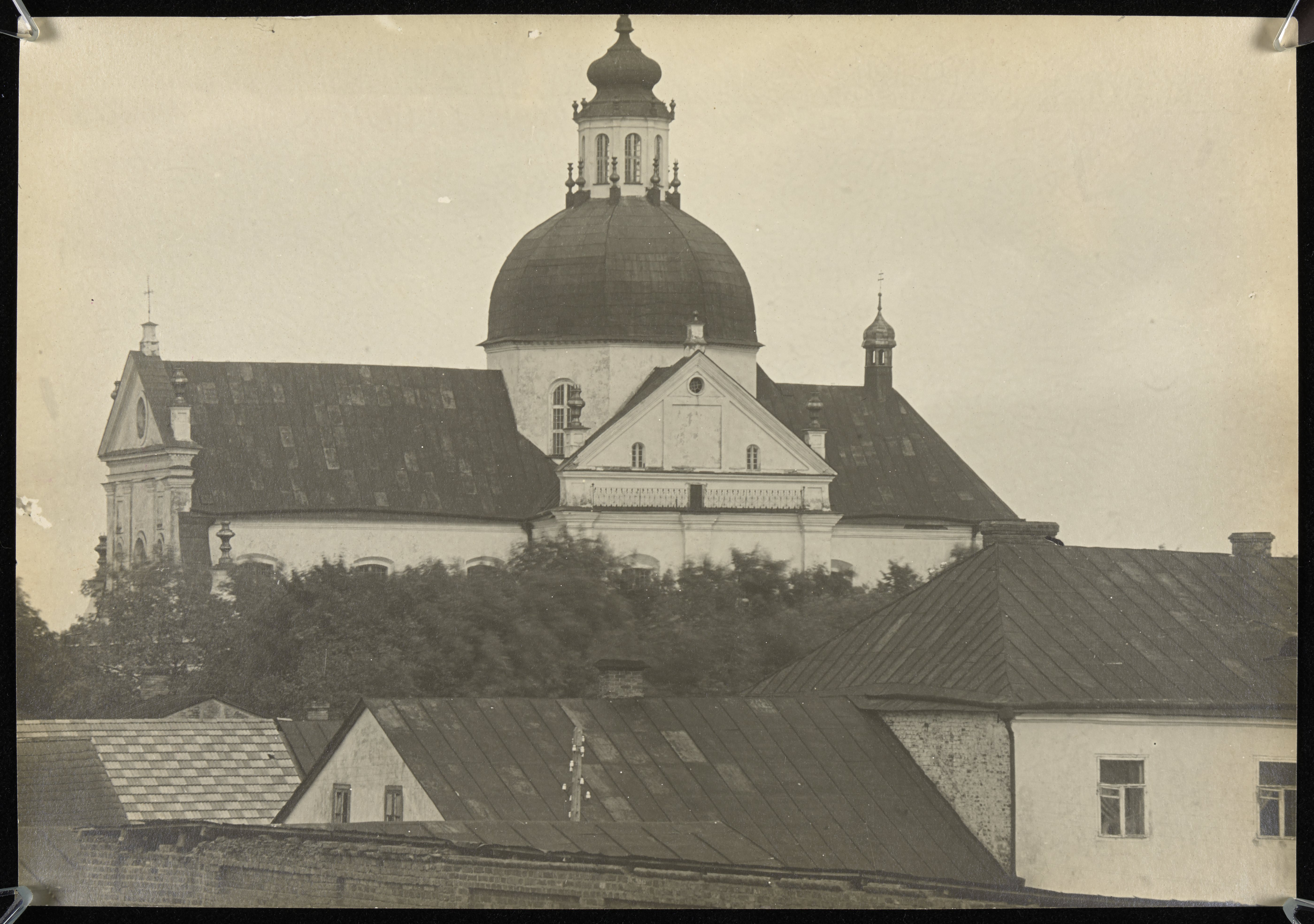 Беларуская (тарашкевіца): Нясьвіж (Niaśviž). Фарны касьцёл (Fara)